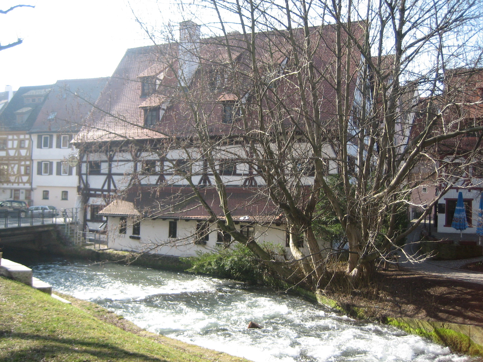 im Fischerviertel